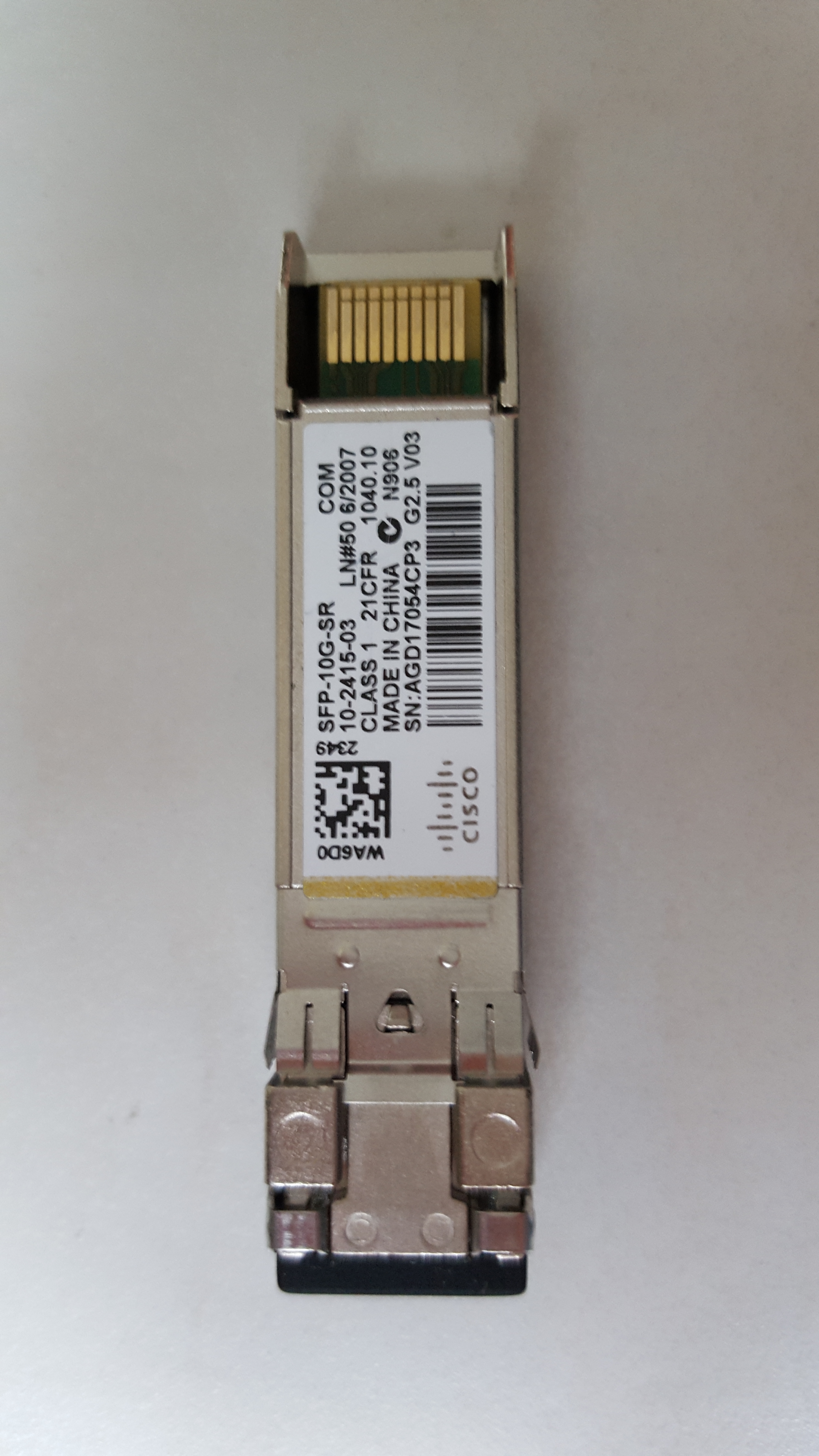 SFP CISCO